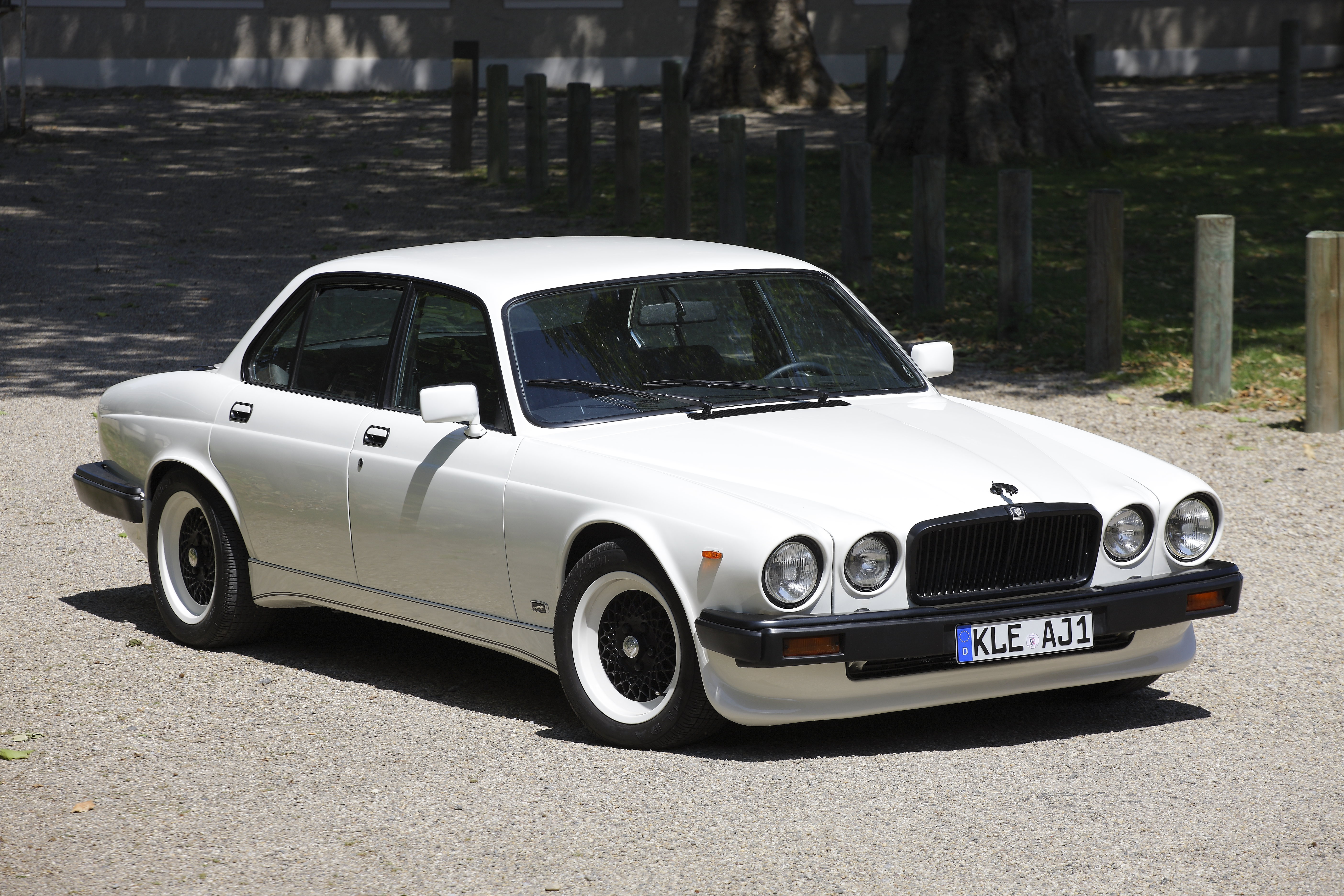 1982, Arden Werksfoto Fotograf Heinz Holzbach 1982 wurde der Arden Jaguar AJ1, der erste von Arden voll umgebaute Jaguar, präsentiert.